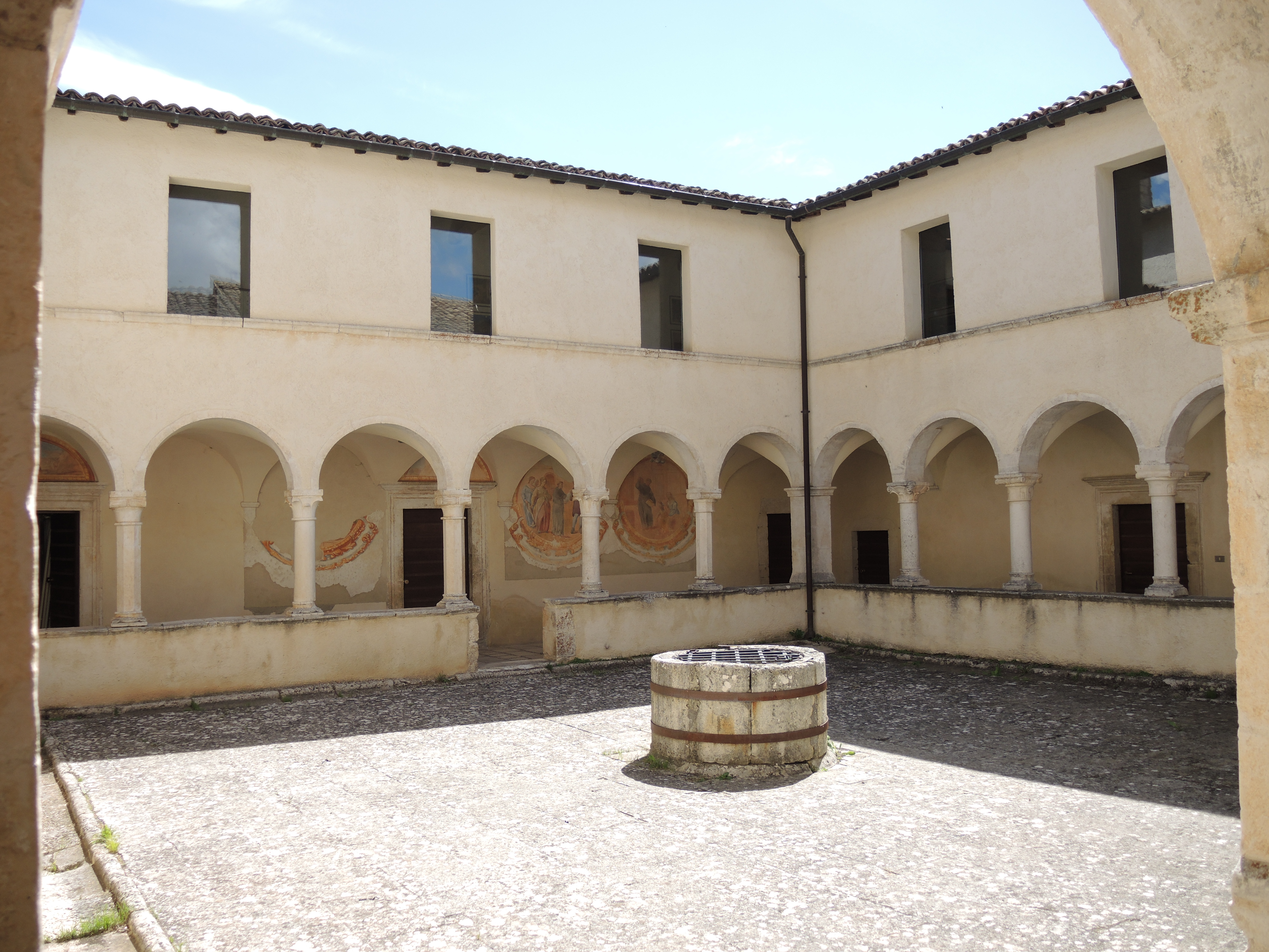 Navelli - Convento di Sant'Antonio